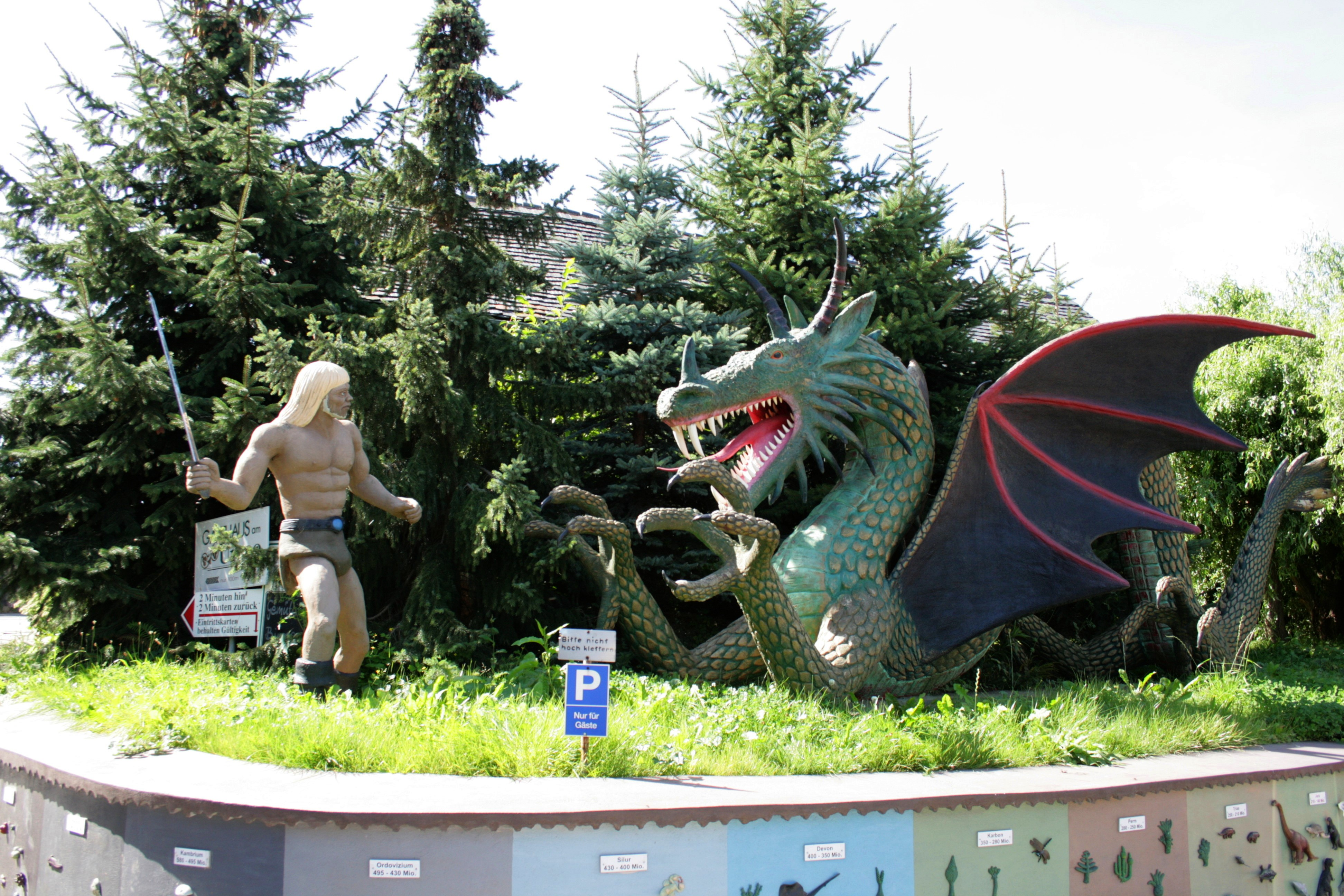 Bautzen-Kleinwelka